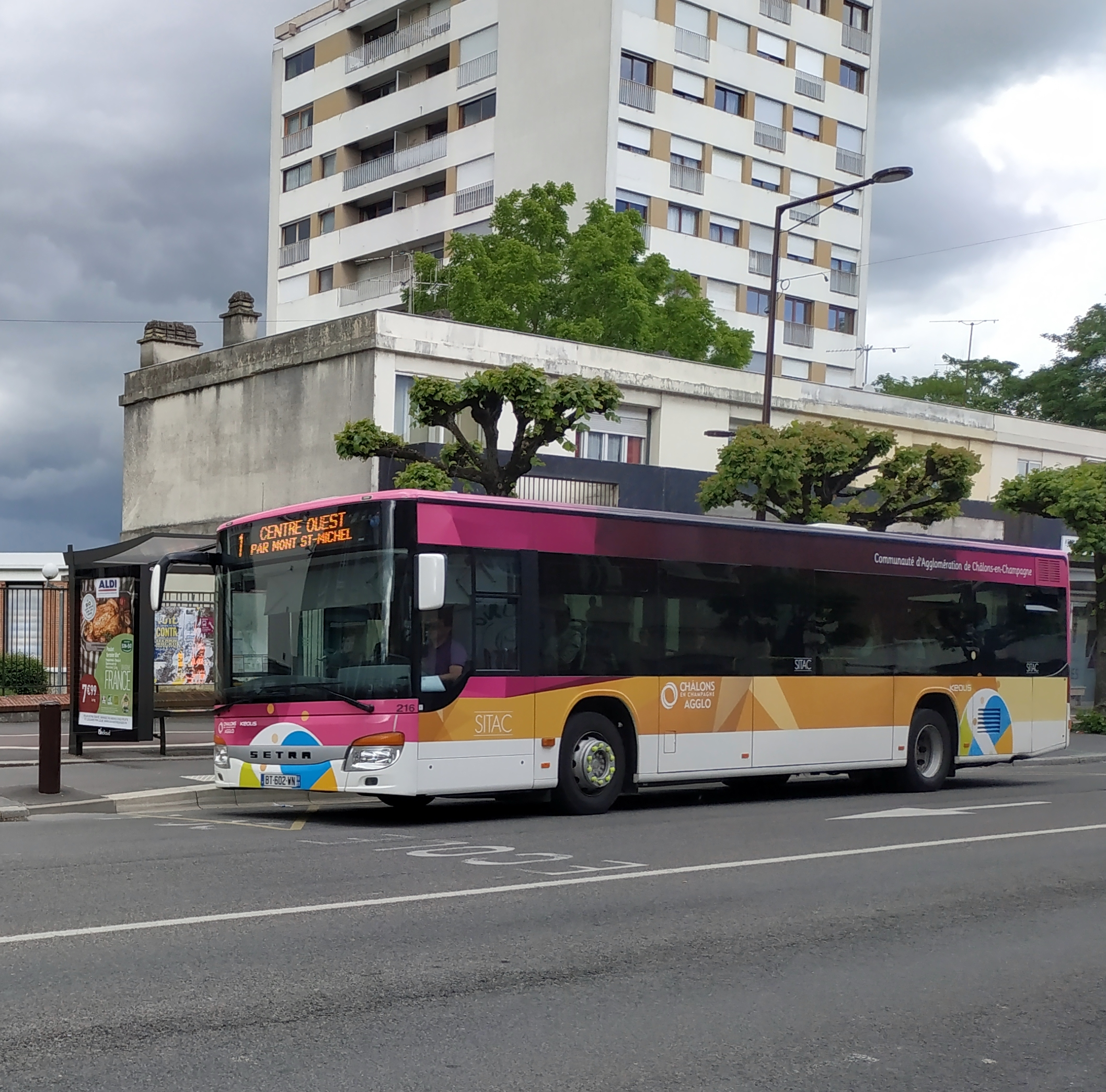 S 415 NF en circulation sur le SITAC à Châlons-en-Champagne